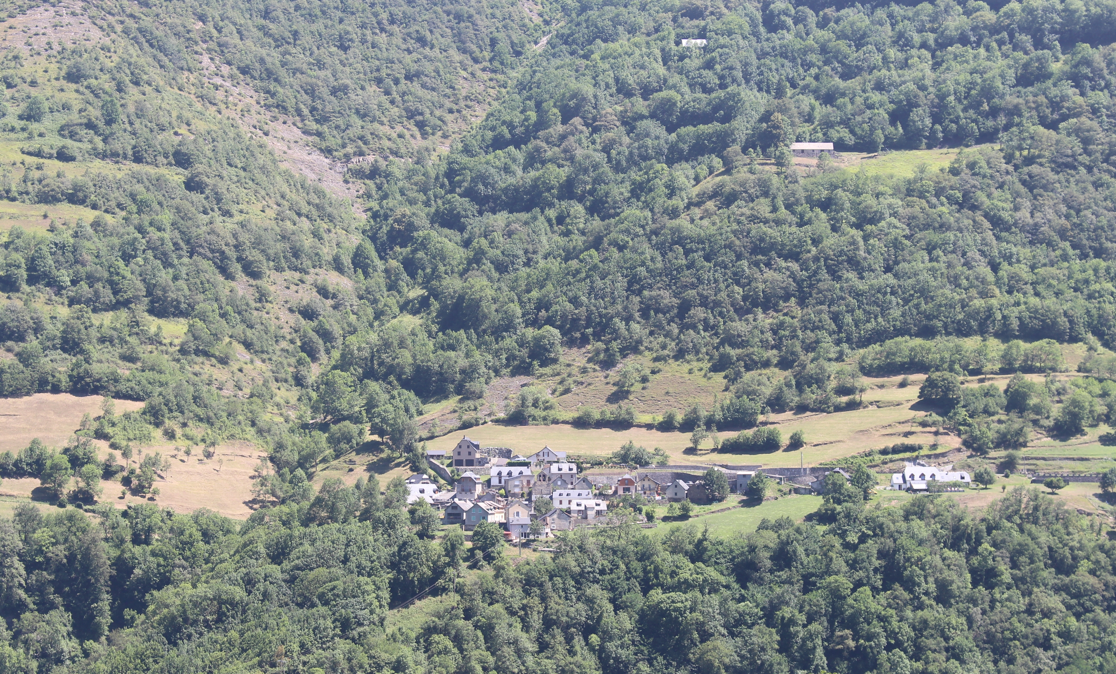 Vizos (Hautes-Pyrénées)